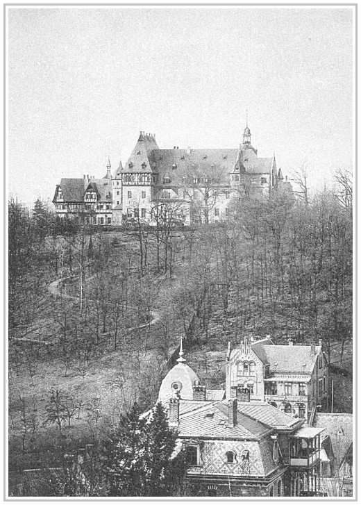 Ansicht der Eichel'schen Villa und des umgebenden Parks